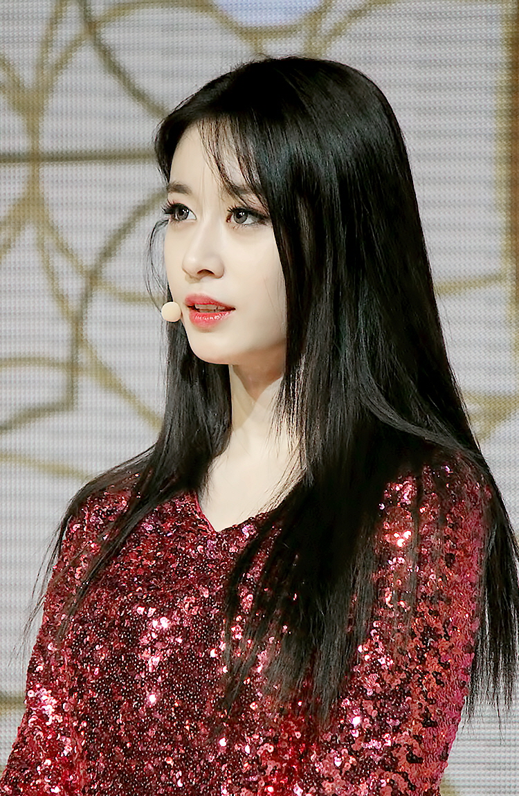 170614 티아라 쇼케이스 직찍